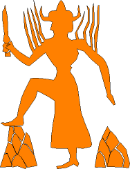 Utilisateur:Denis Drouillet